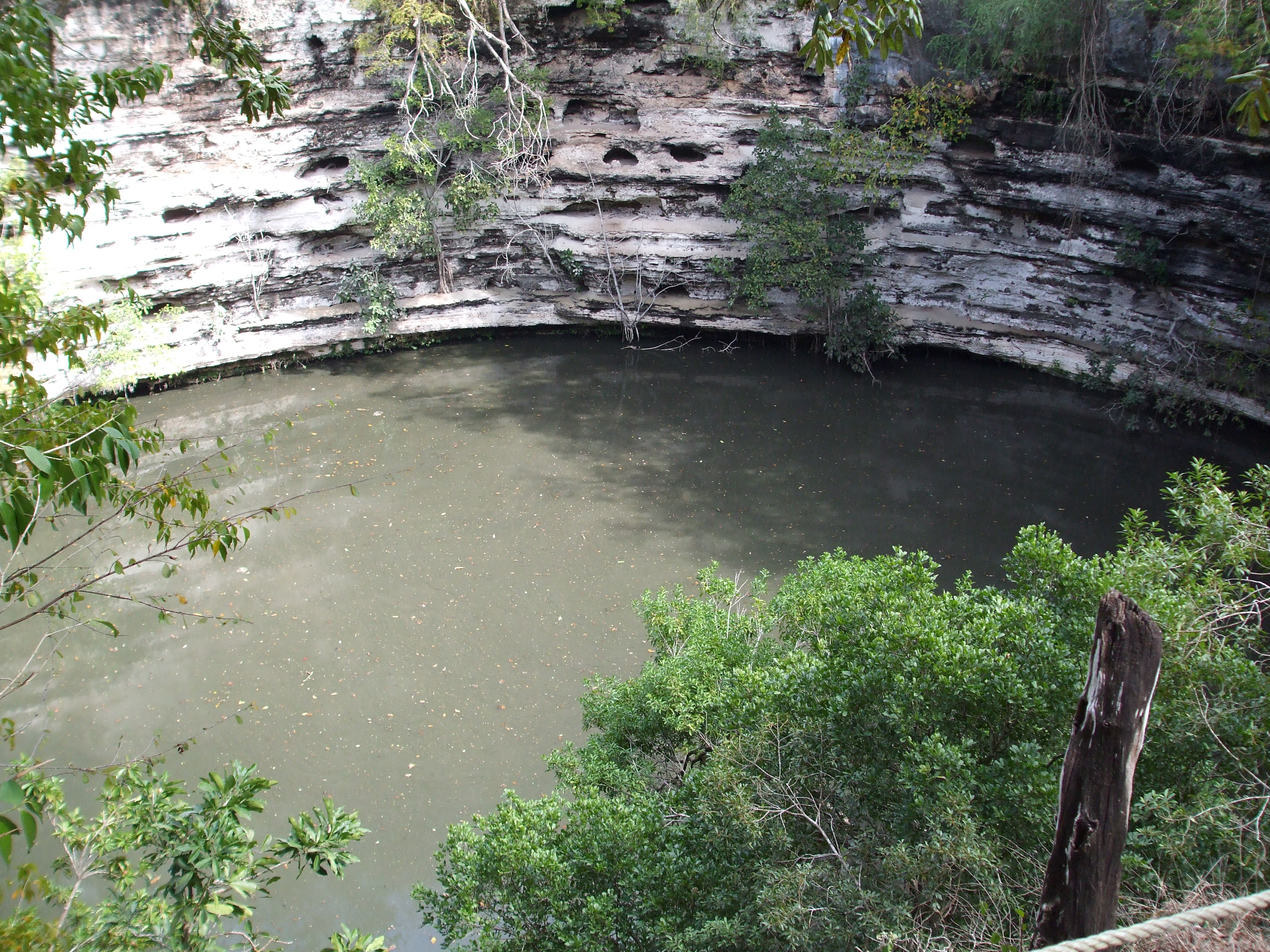 Cenote en chichenitza